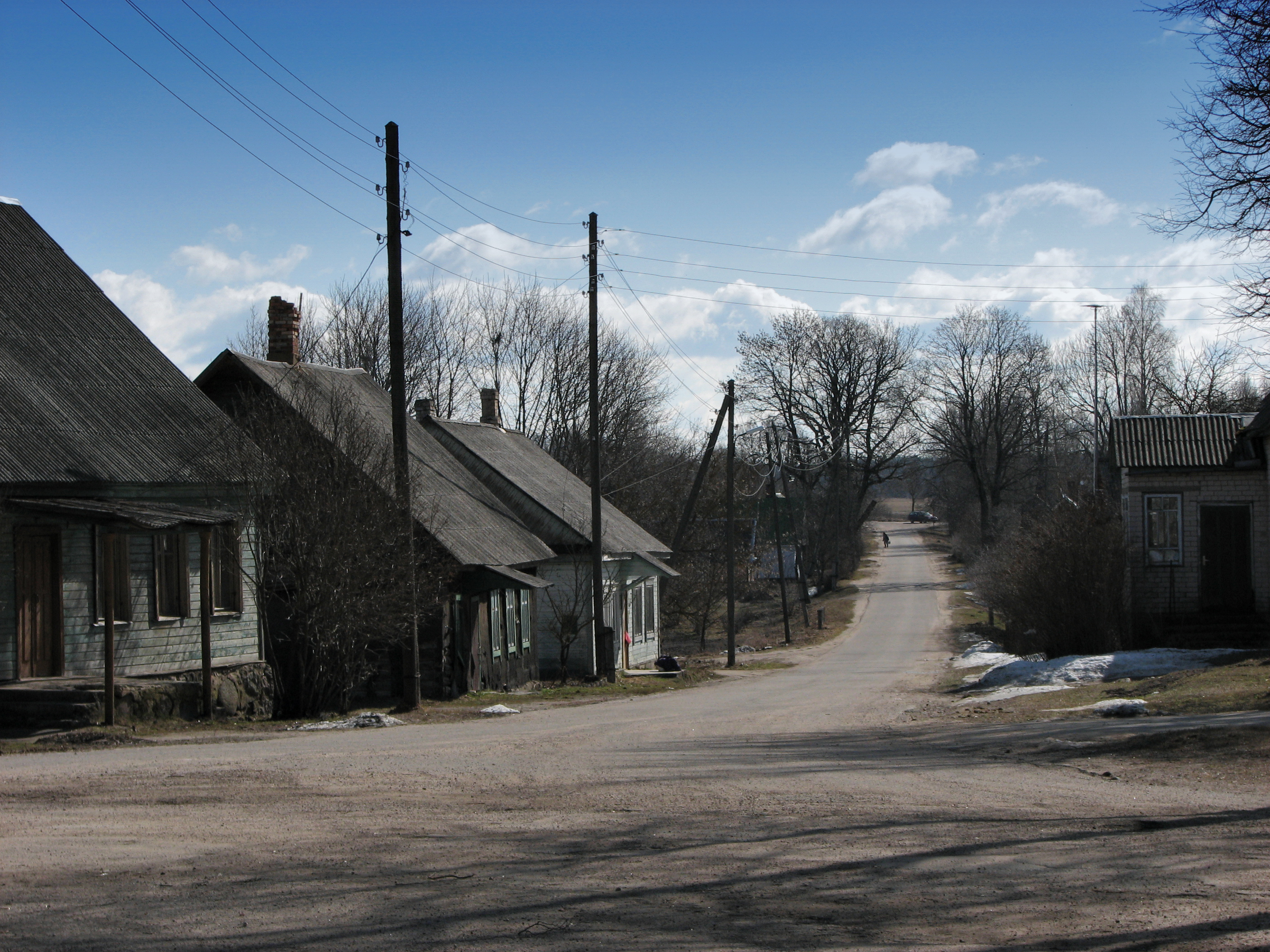 улица в Скрудалине